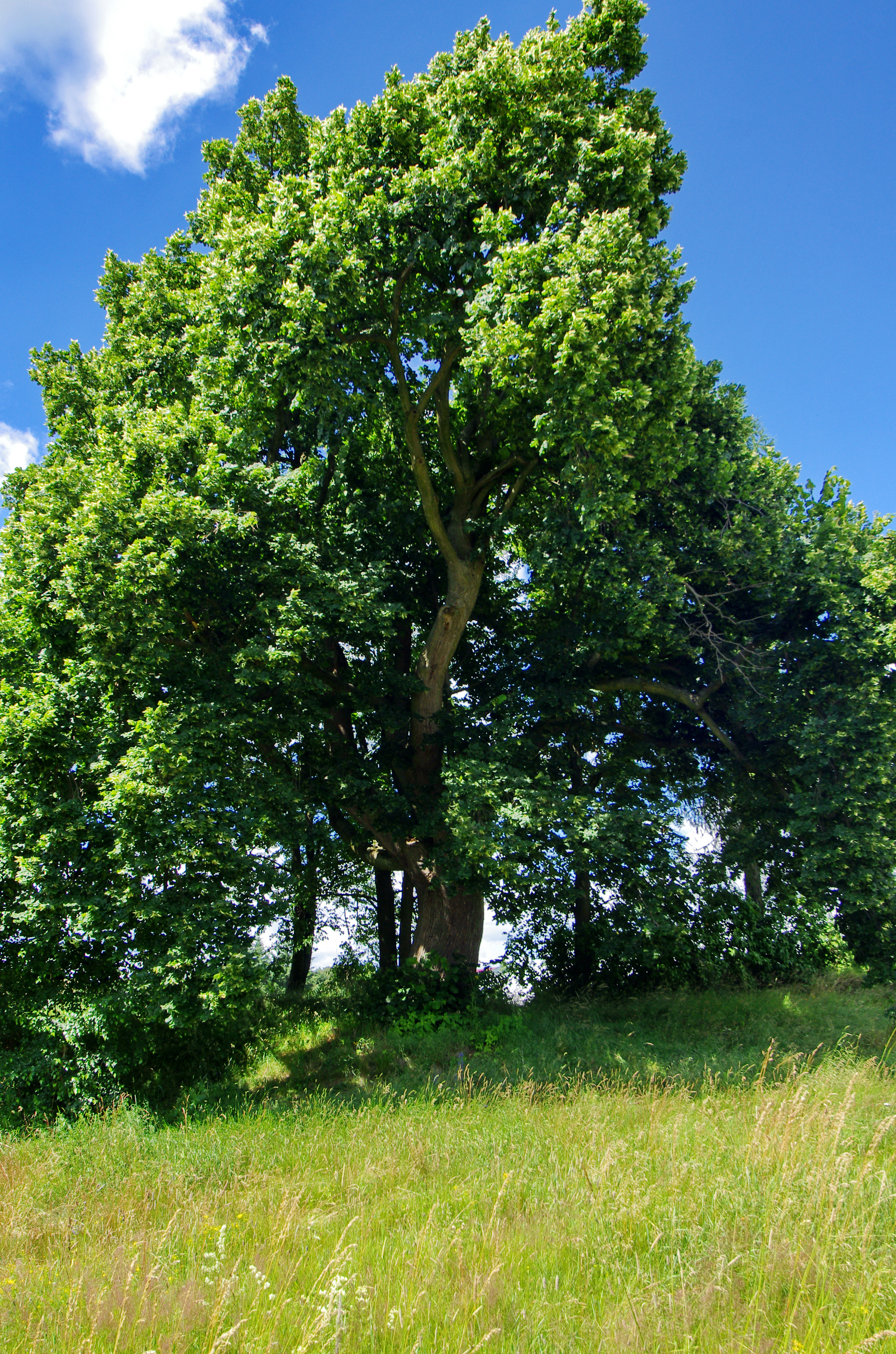 Památný strom - Jakoubkova lípa, Žlutice, okres Karlovy Vary